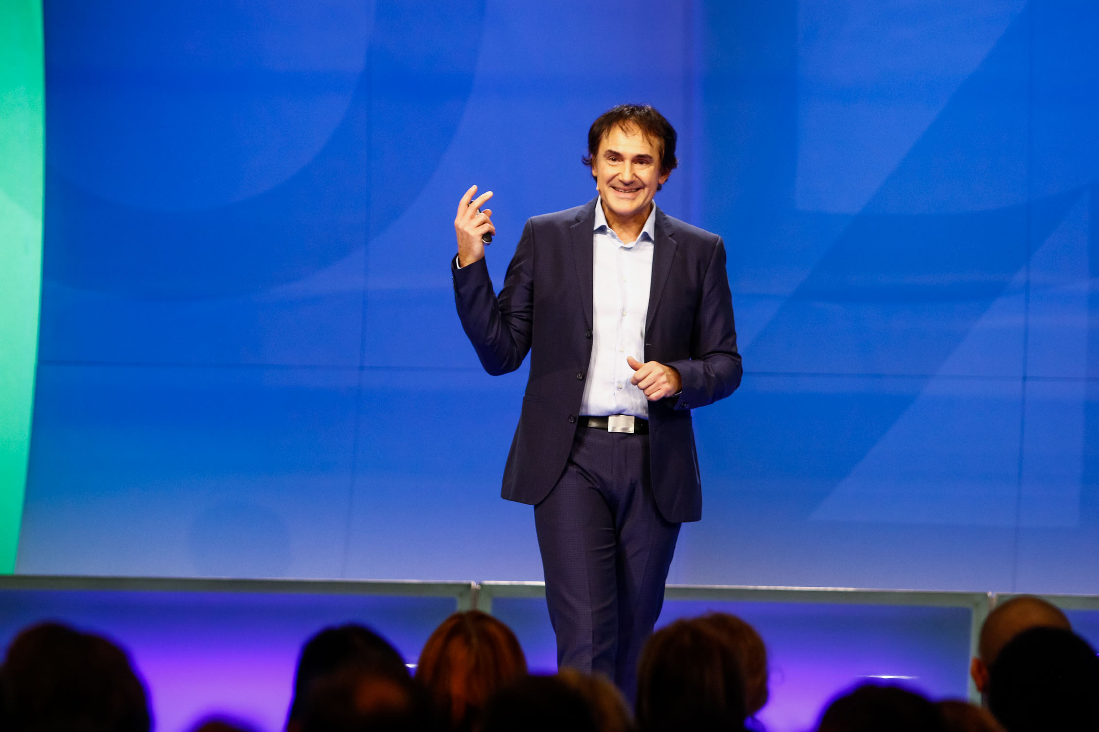 Dr. Roman F. Szeliga, Keynote Speaker und Buchautor